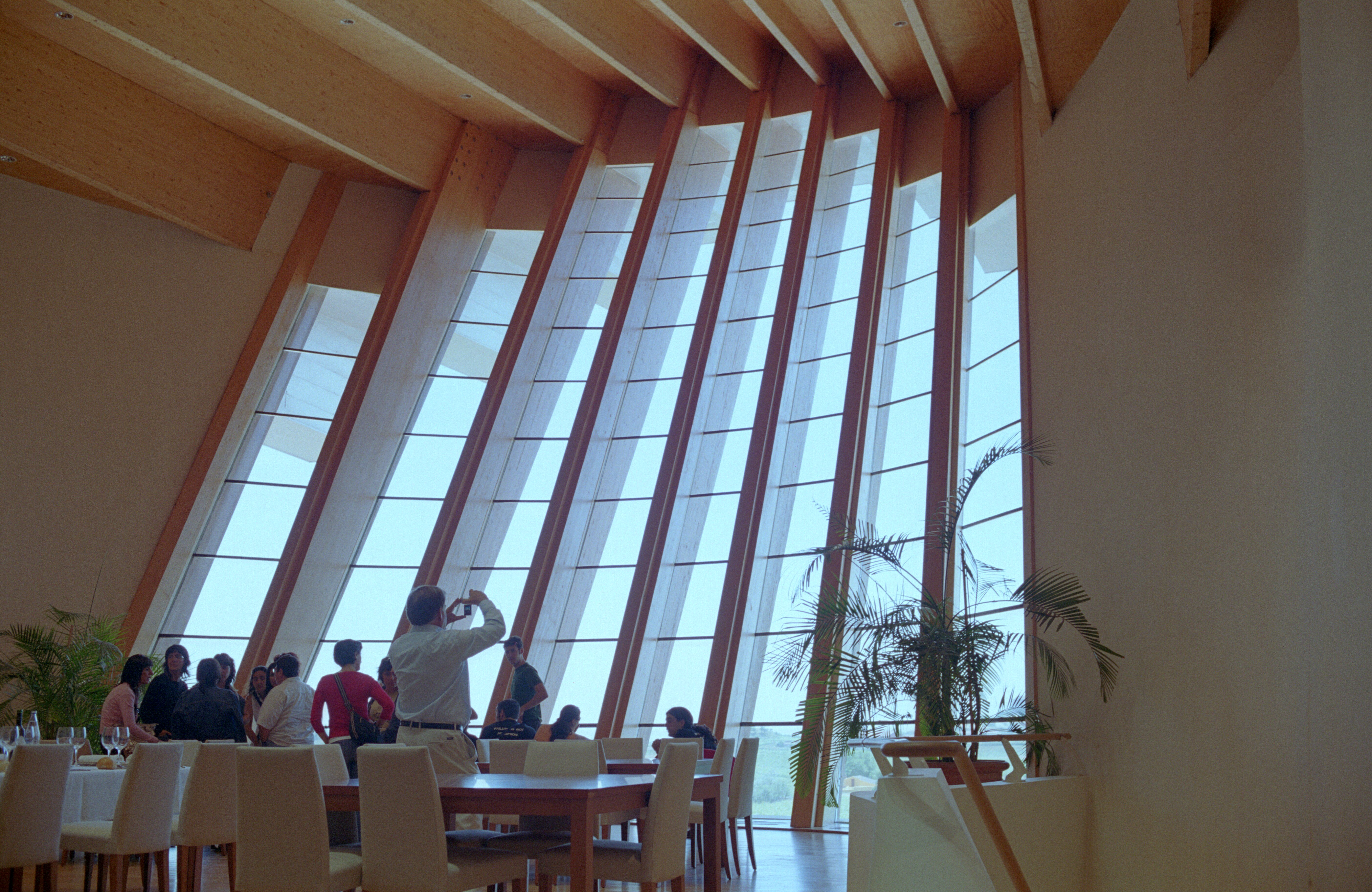 Bodegas Ysios LSI La Rioja